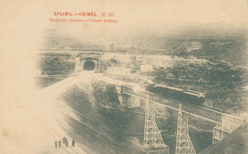 Графский тоннель на Лозово-Севастопольской ж. д. Открытка конца XIX века.